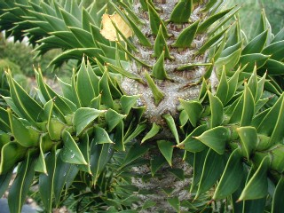 Abetræ / Araucaria araucana